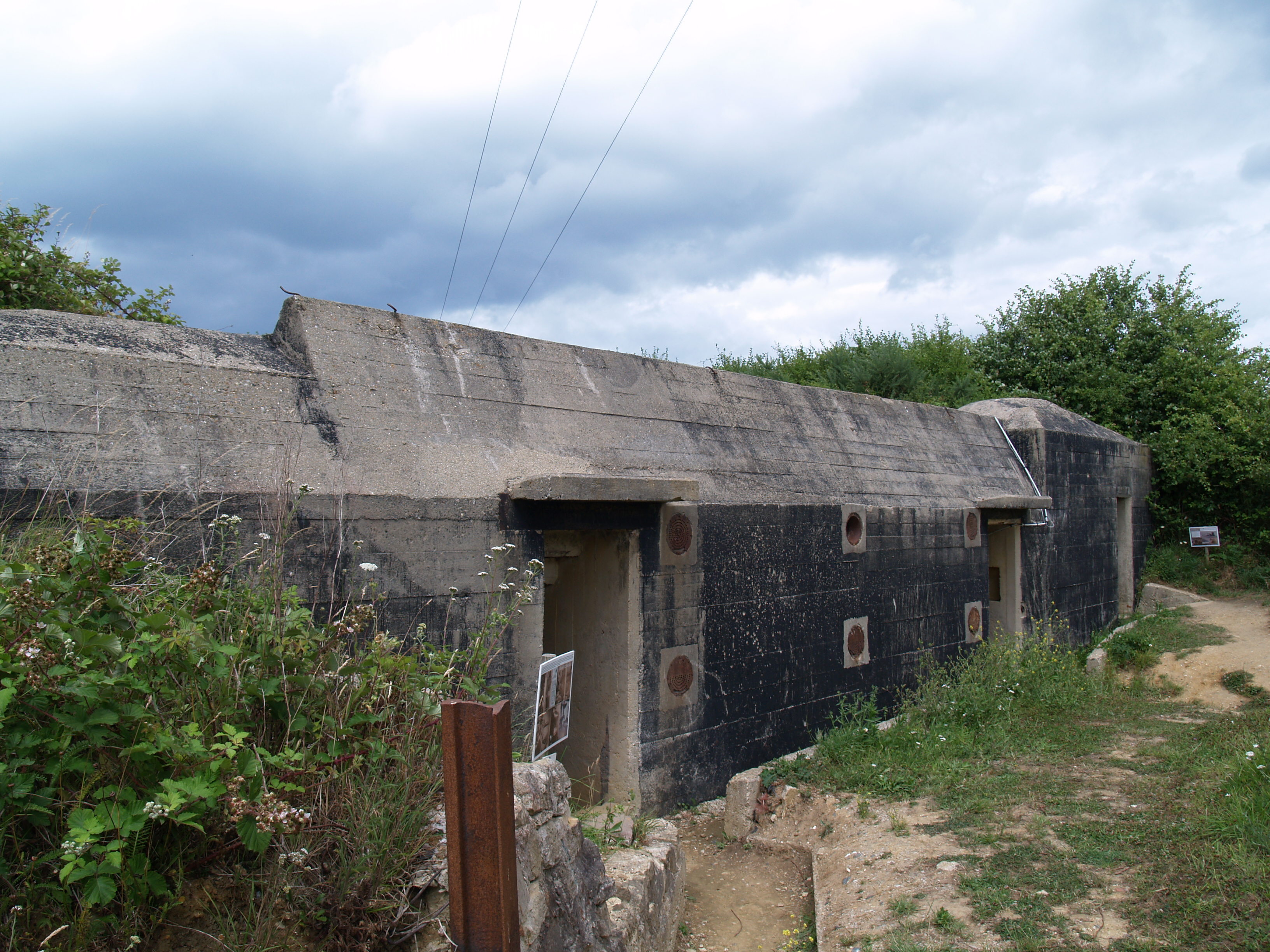 Maisy Battery